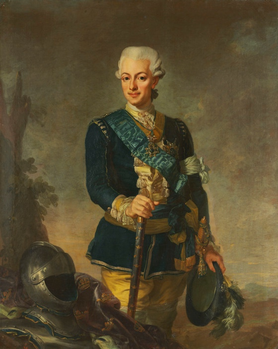 Kung Gustav III iförd Svea Livgardes uniform m/1779, avporträtterad 1779 av Lorens Pasch (1733-1805).